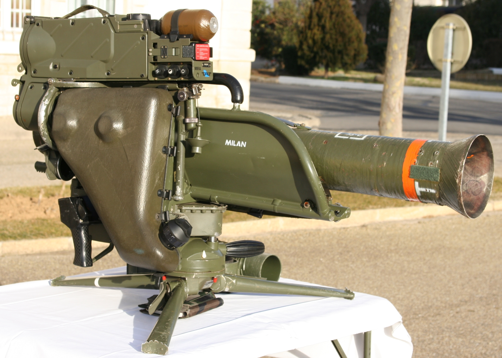 Lance-missile anti-char Milan du 2e Régiment étranger d'infanterie (France)